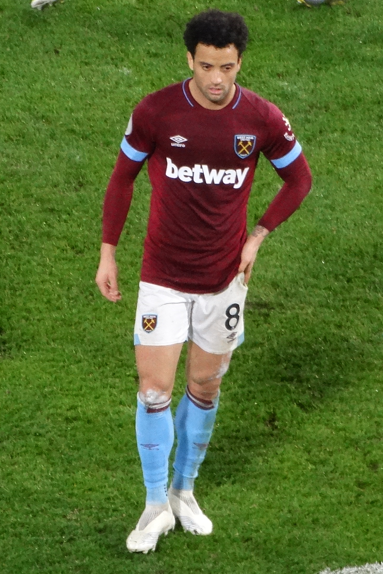 Chelsea v West Ham 9 April 2019